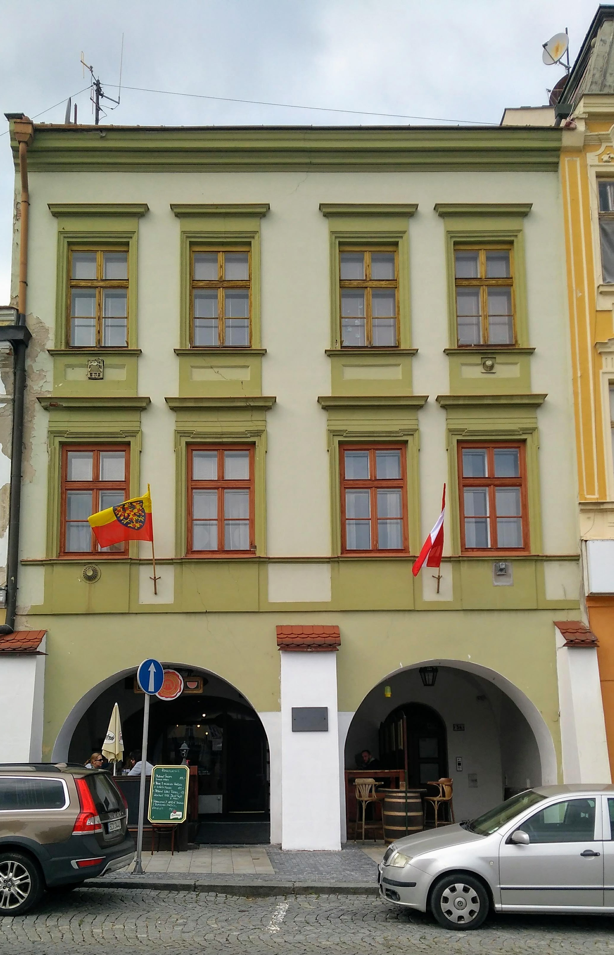 Měšťanský dům U zlatého slunce (Kroměříž), Velké nám. 34/13, Kroměříž